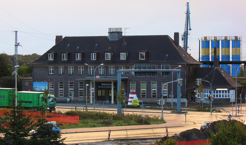 Beschreibung: Bahnhof am Rügendamm Fotograf: Darkone, 21. September 2004